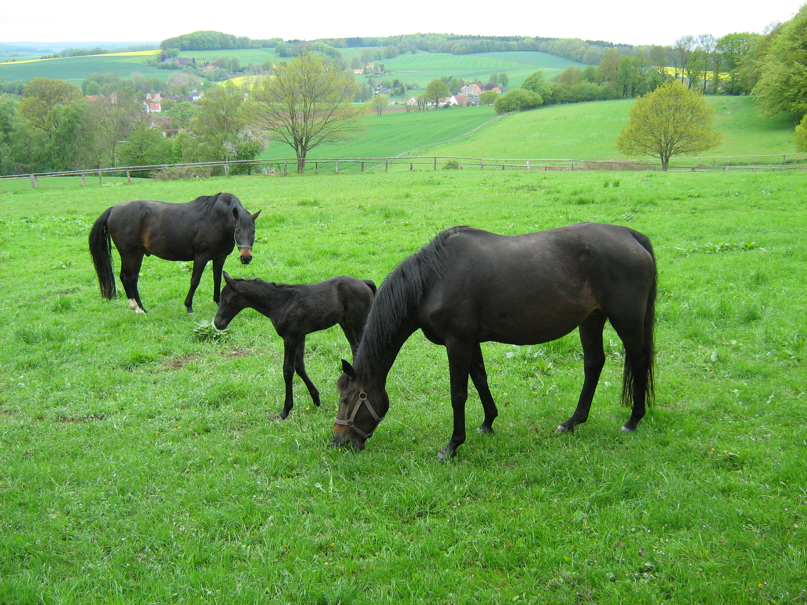 eine typische Pferde Familie gesehen in Oldendorf (Melle)